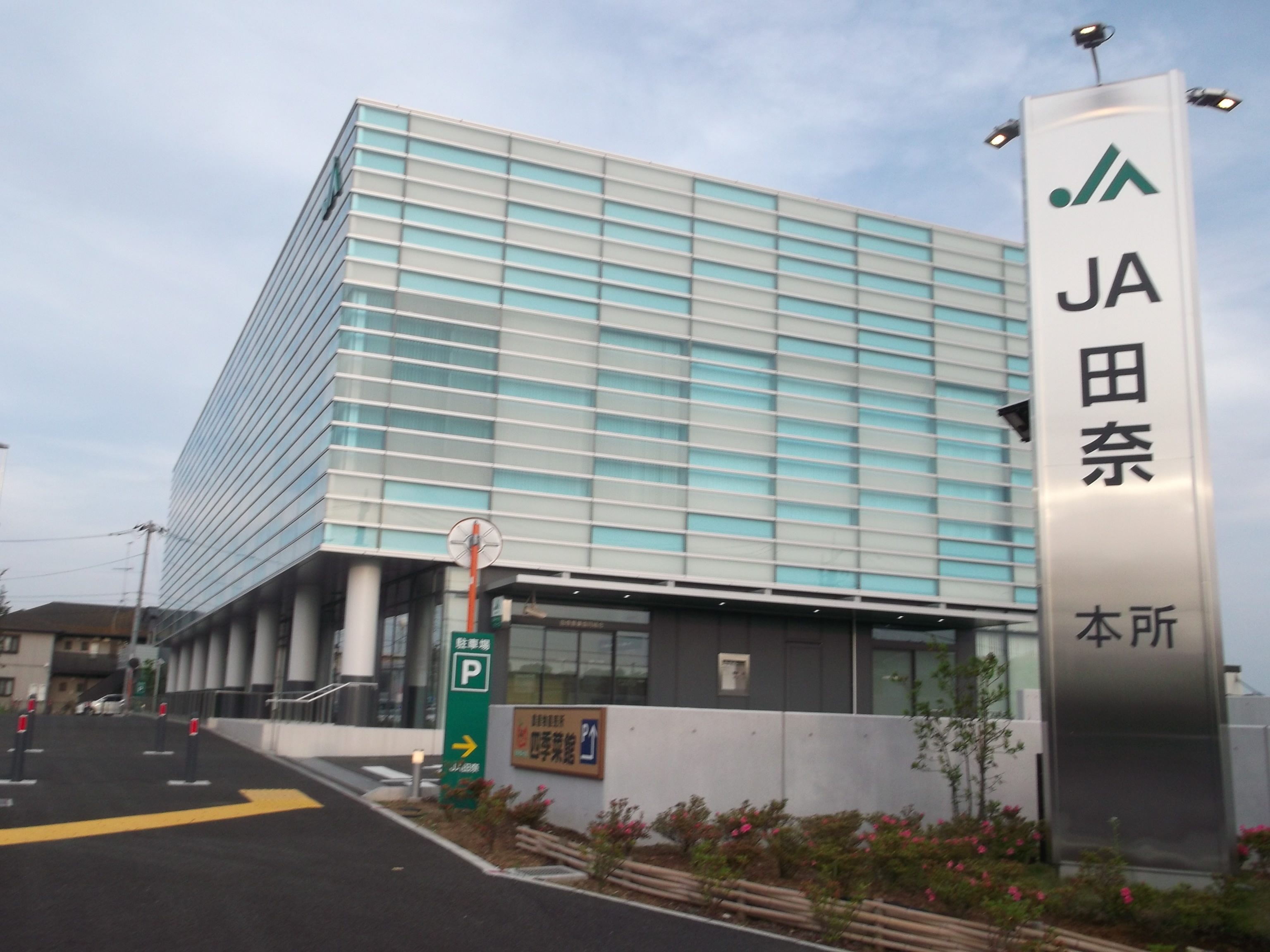 田奈農業協同組合 本所